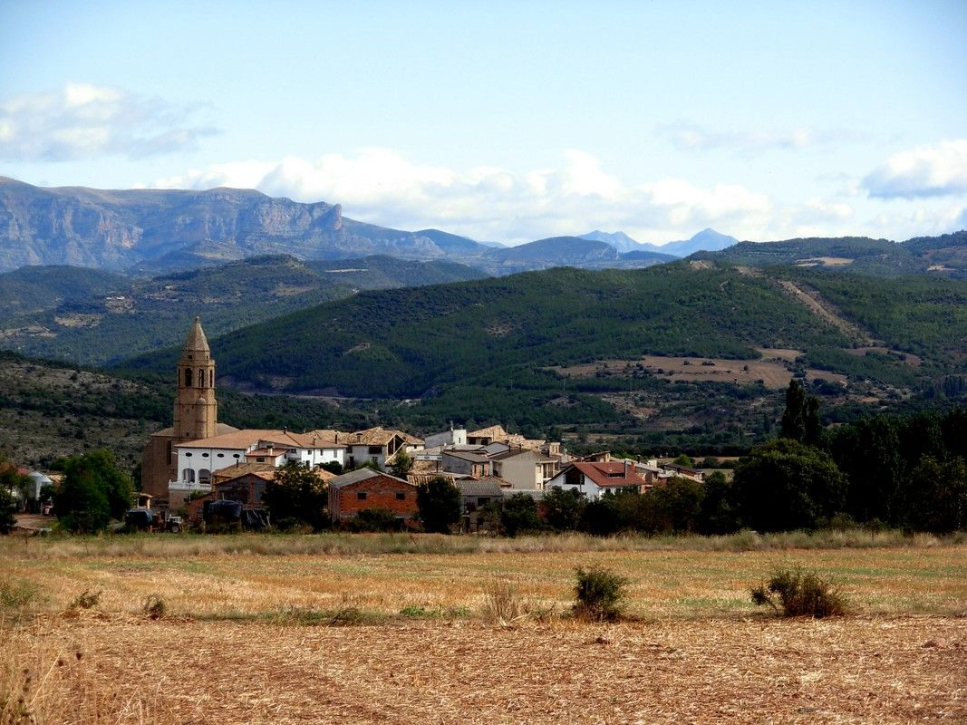 Vista parcial